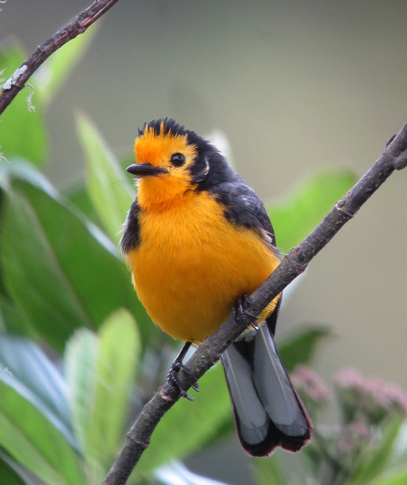 Manizales, Caldas, Colombia